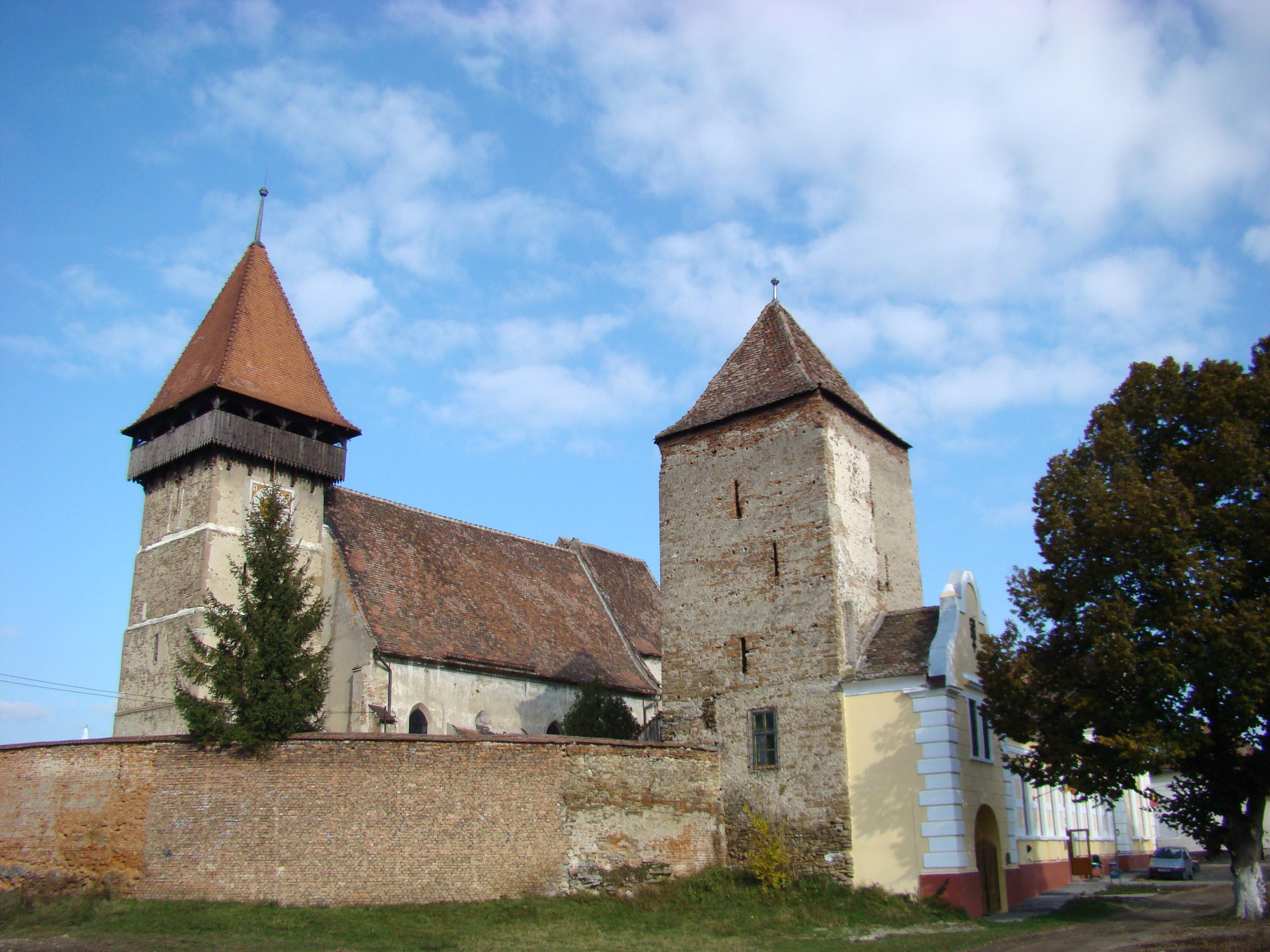 Biserica evanghelică din Brateiu 02